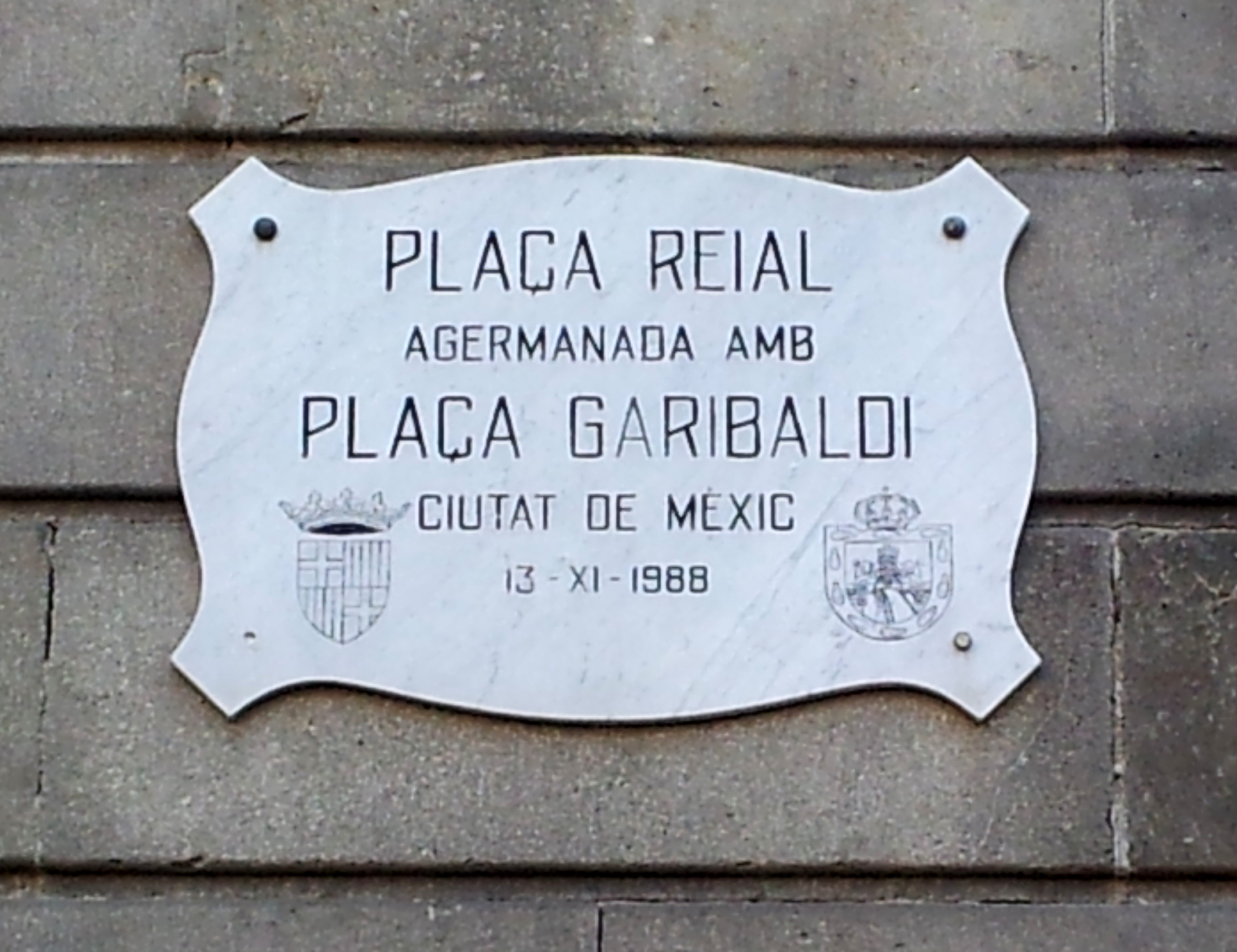 Plaça Reial agermanada AMB Plaça Garibaldi Citutat de Mèxic, 13.11.1988